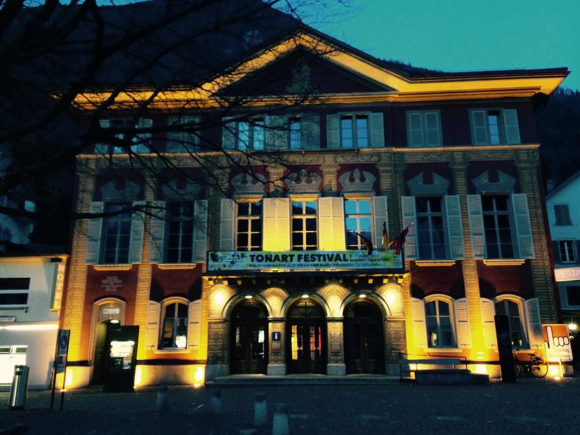 theater(uri)